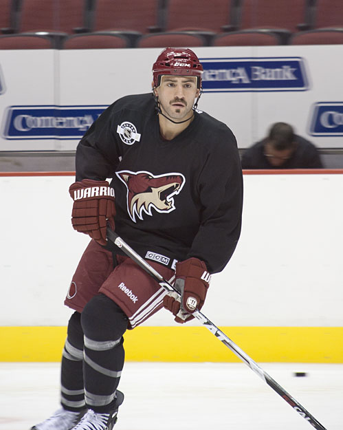 Paul Bissonnette